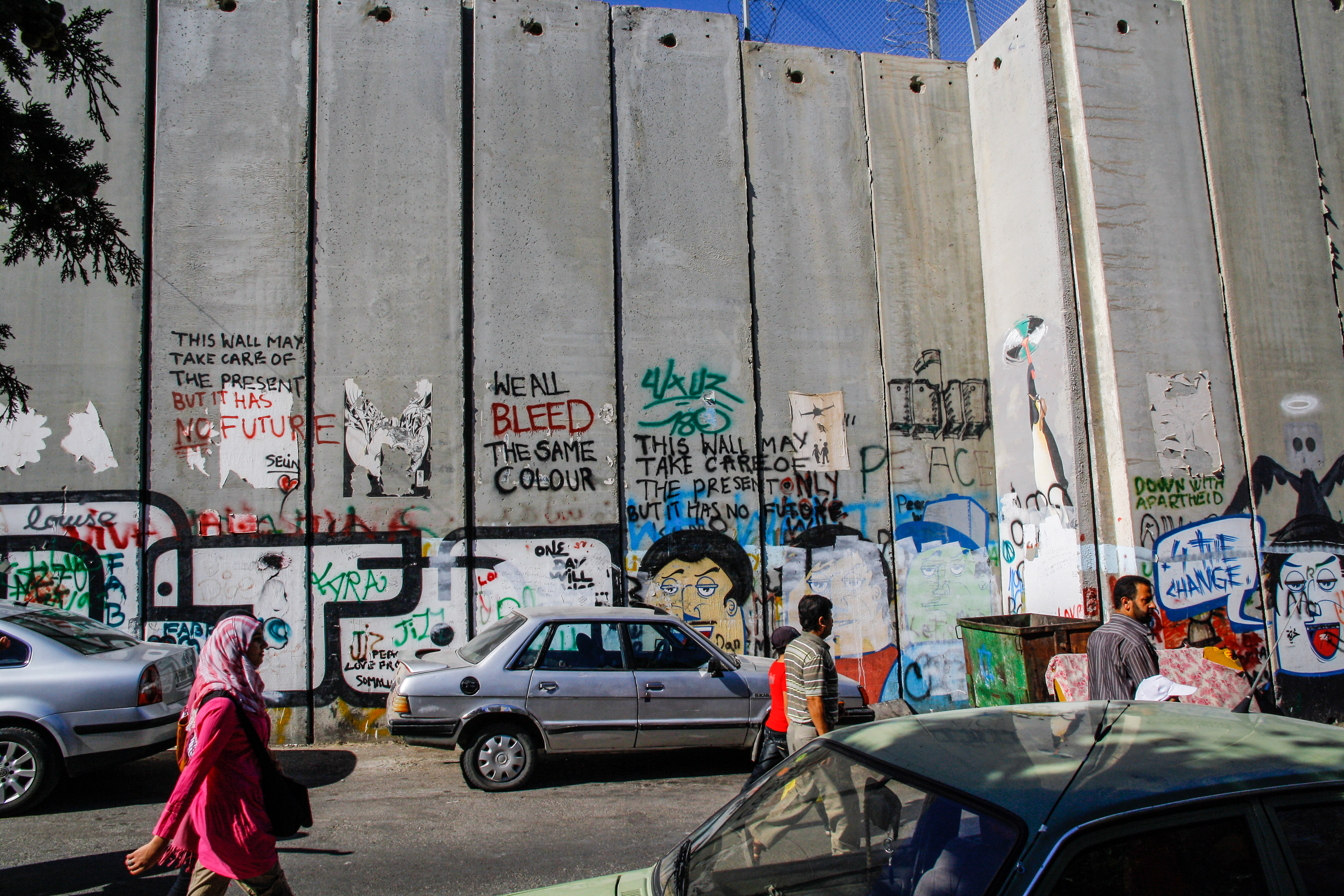 Mur israélo-palestinien côté Palestine, entre Yérushalaim et Beitlehem. Le vendredi de nombreux musulmans passent la frontière pour aller prier au Dôme du Rocher.